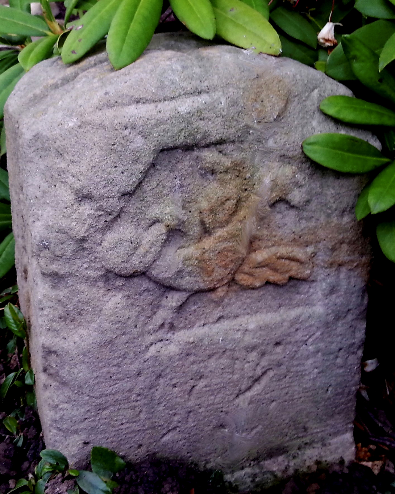 Grenzstein der Grafen von Kesselstatt in der ehemaligen Herrschaft Lösnich